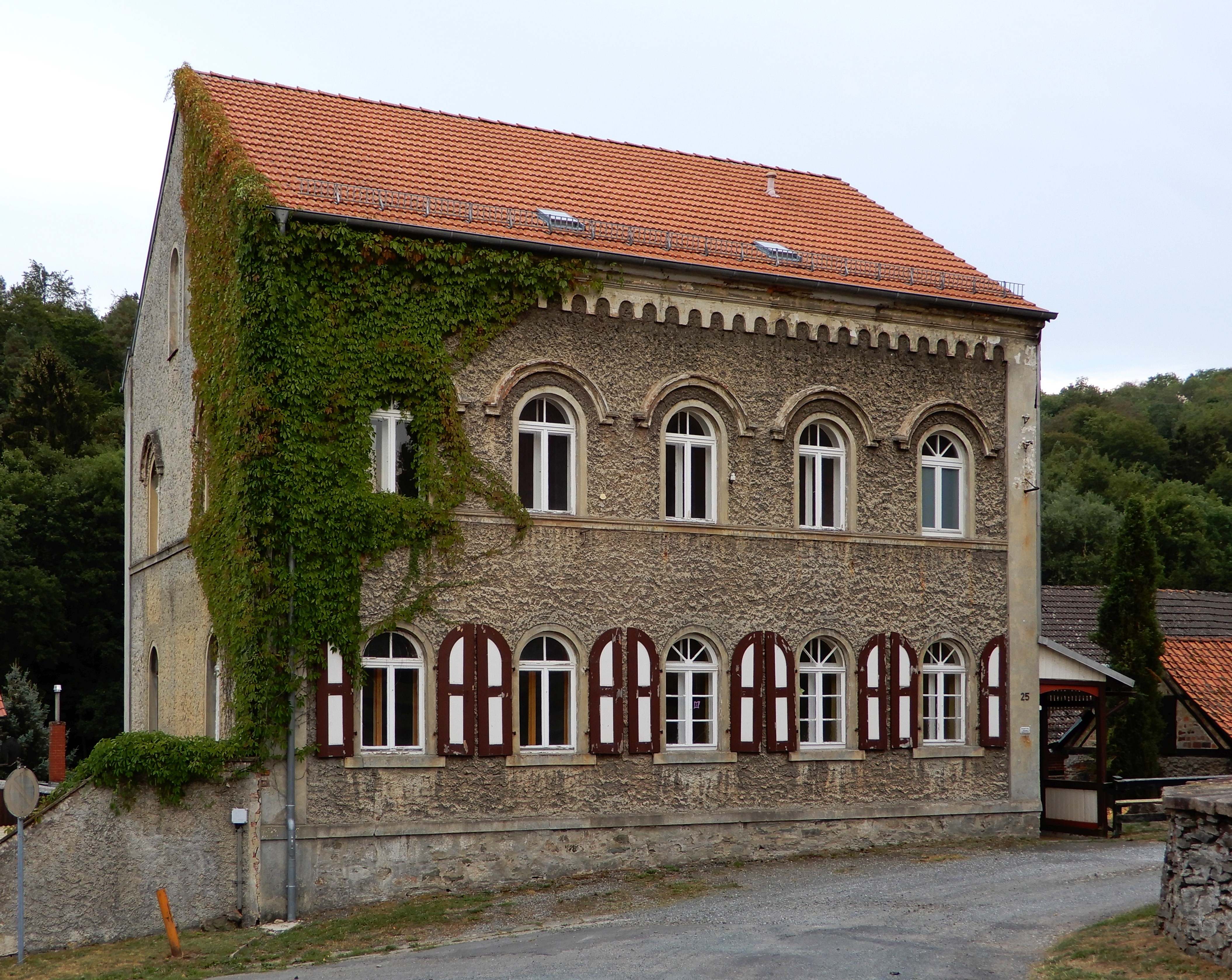 Haus Pfarrgasse 25